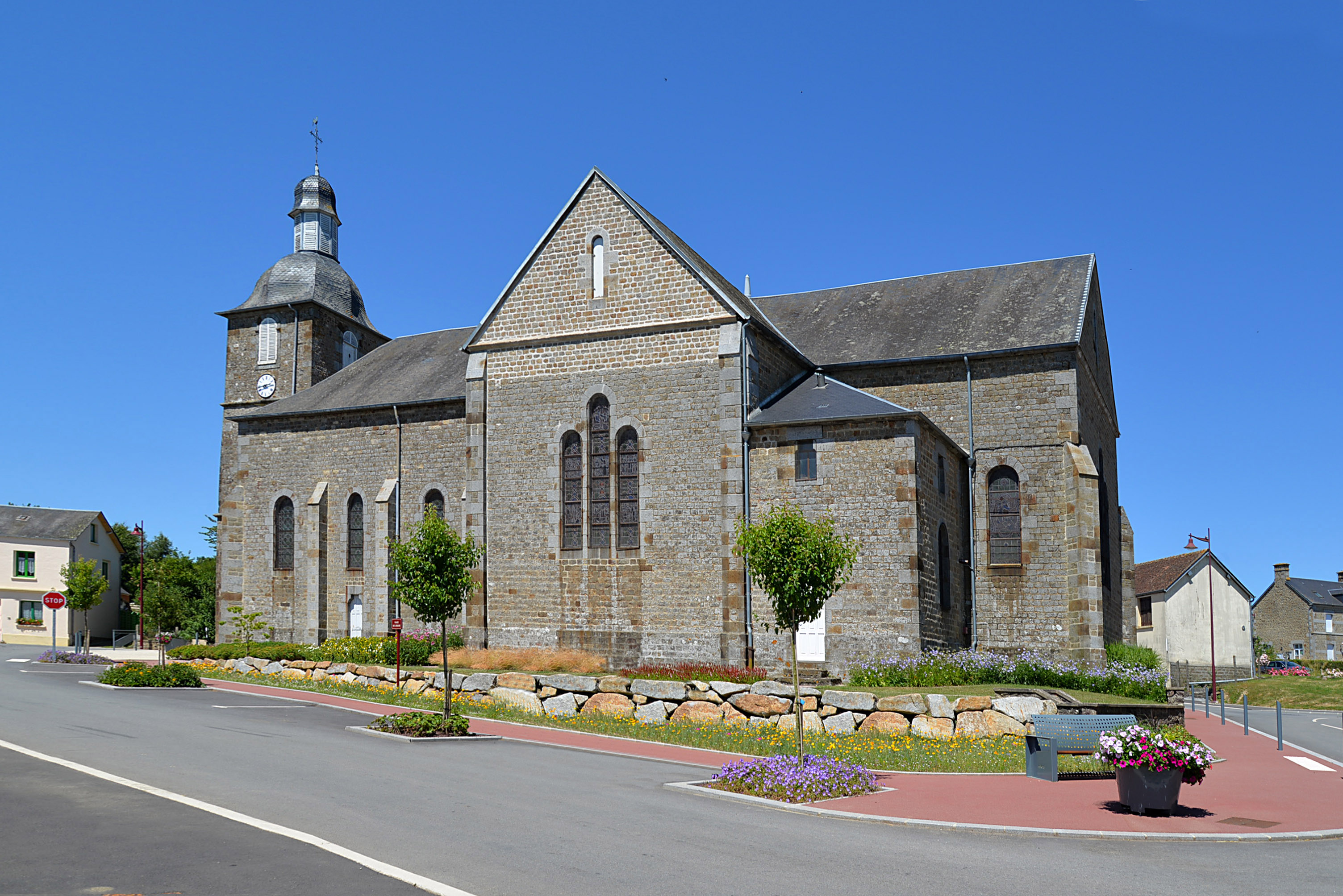 Le Ménil-de-Briouze (Orne)